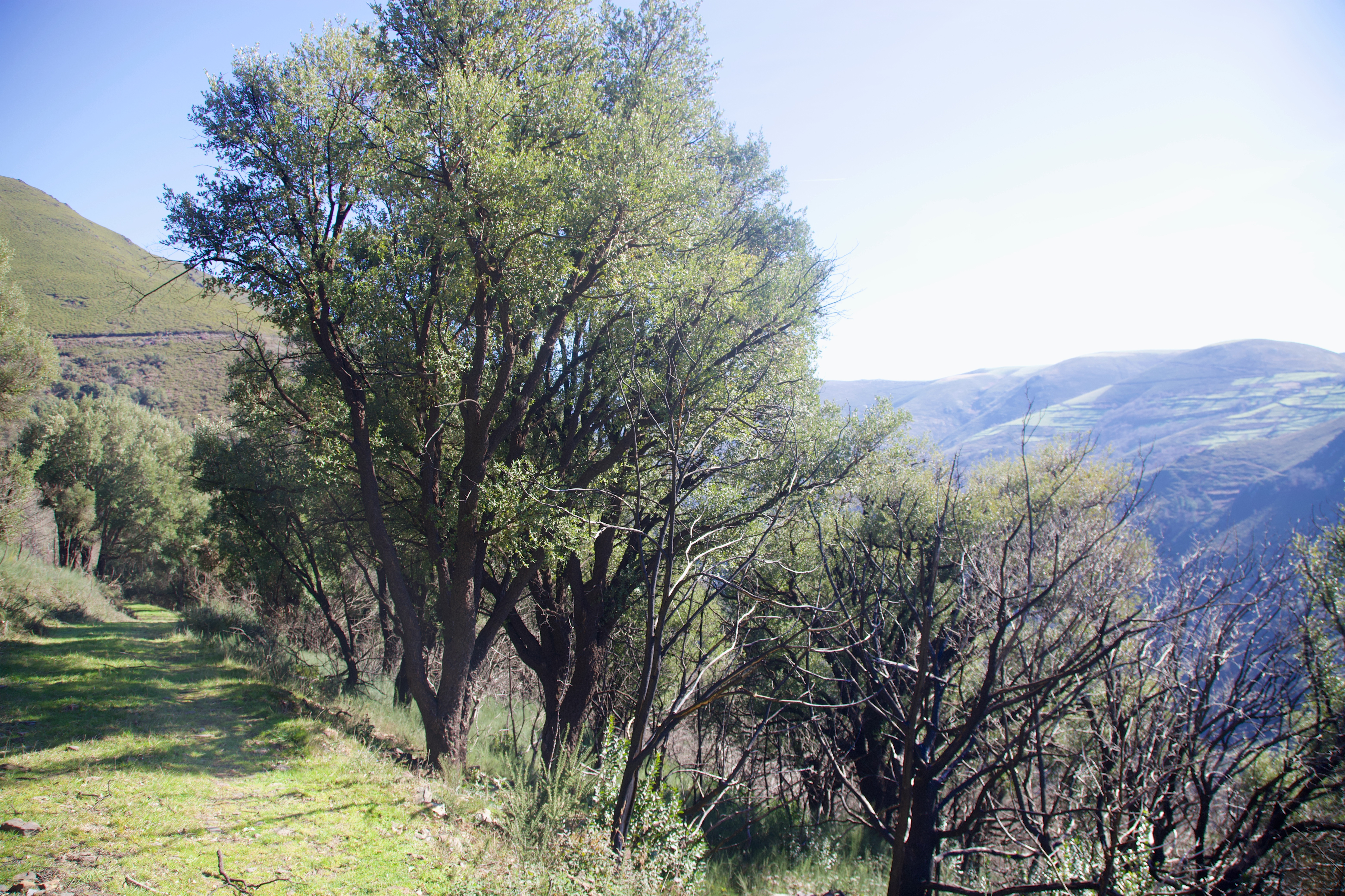 Alcornocal situado en el principado de Asturias. Espacio natural protegido y monumento natural